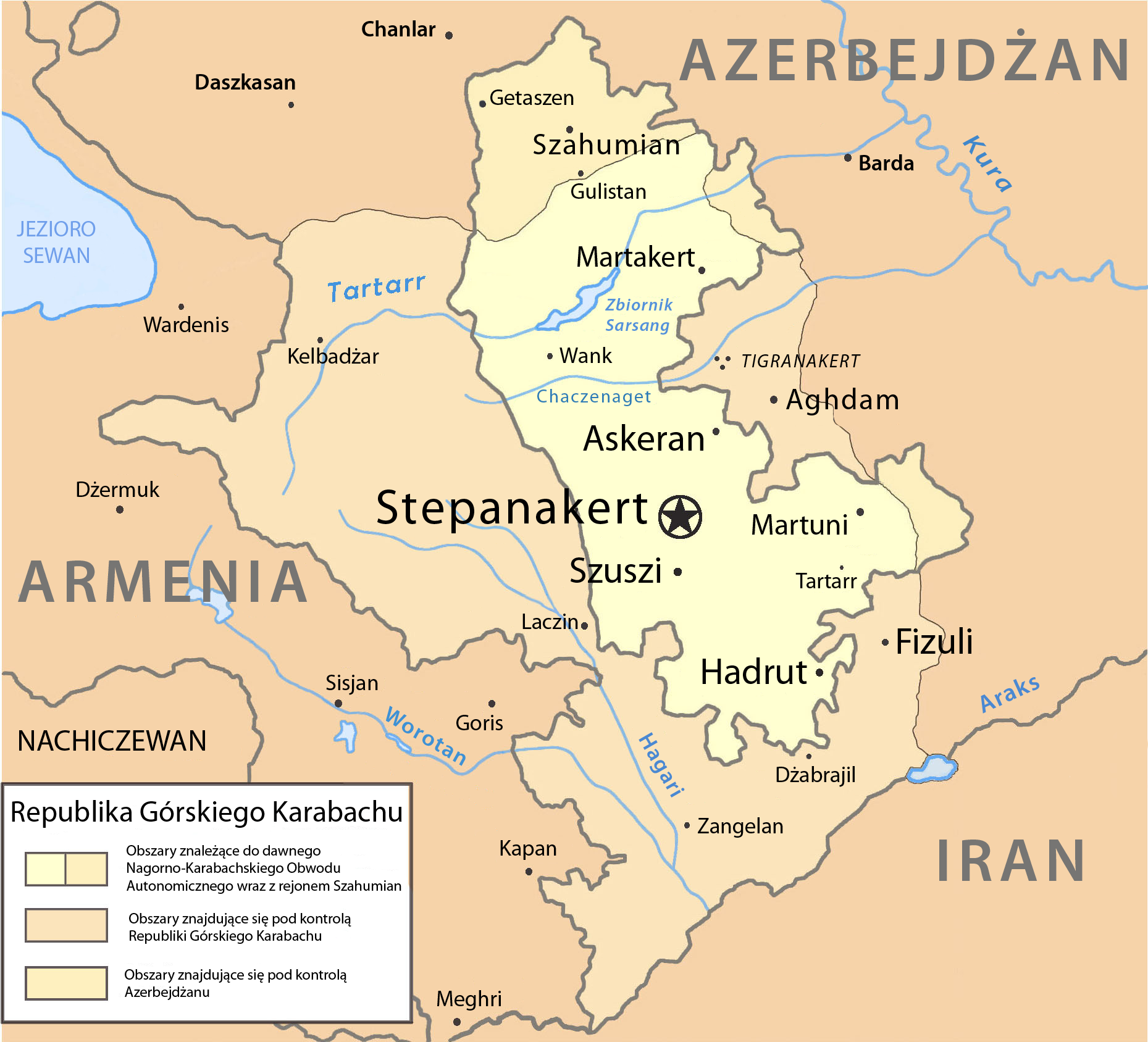 Polska wersja językowa mapy Republiki Górskiego Karabachu. Polish language version of Nagorno Karabakh Republic map.